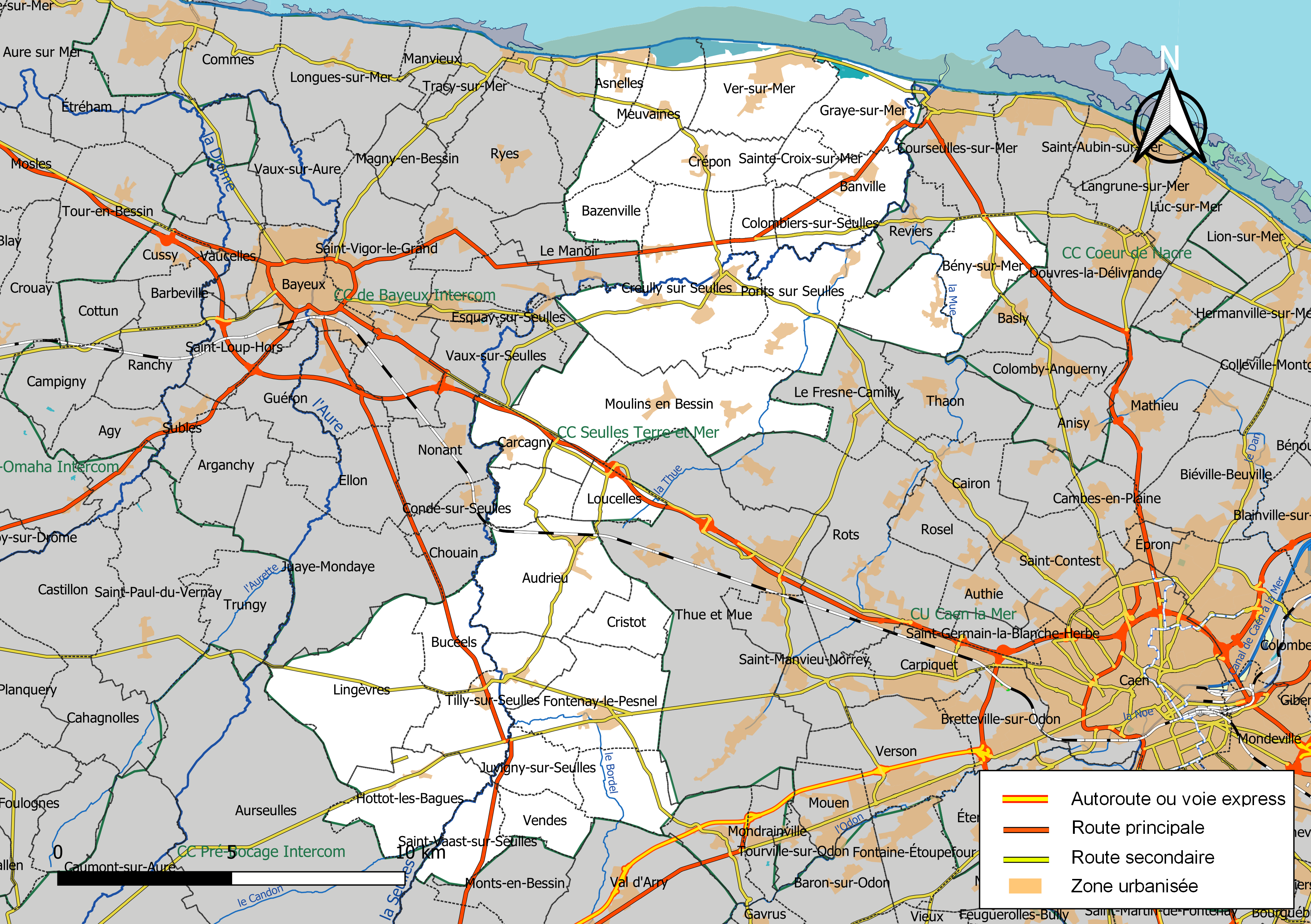 Carte géographique de la Communauté de communes Seulles Terre et Mer, département du Calvados, France. Composition au 1er janvier 2019.